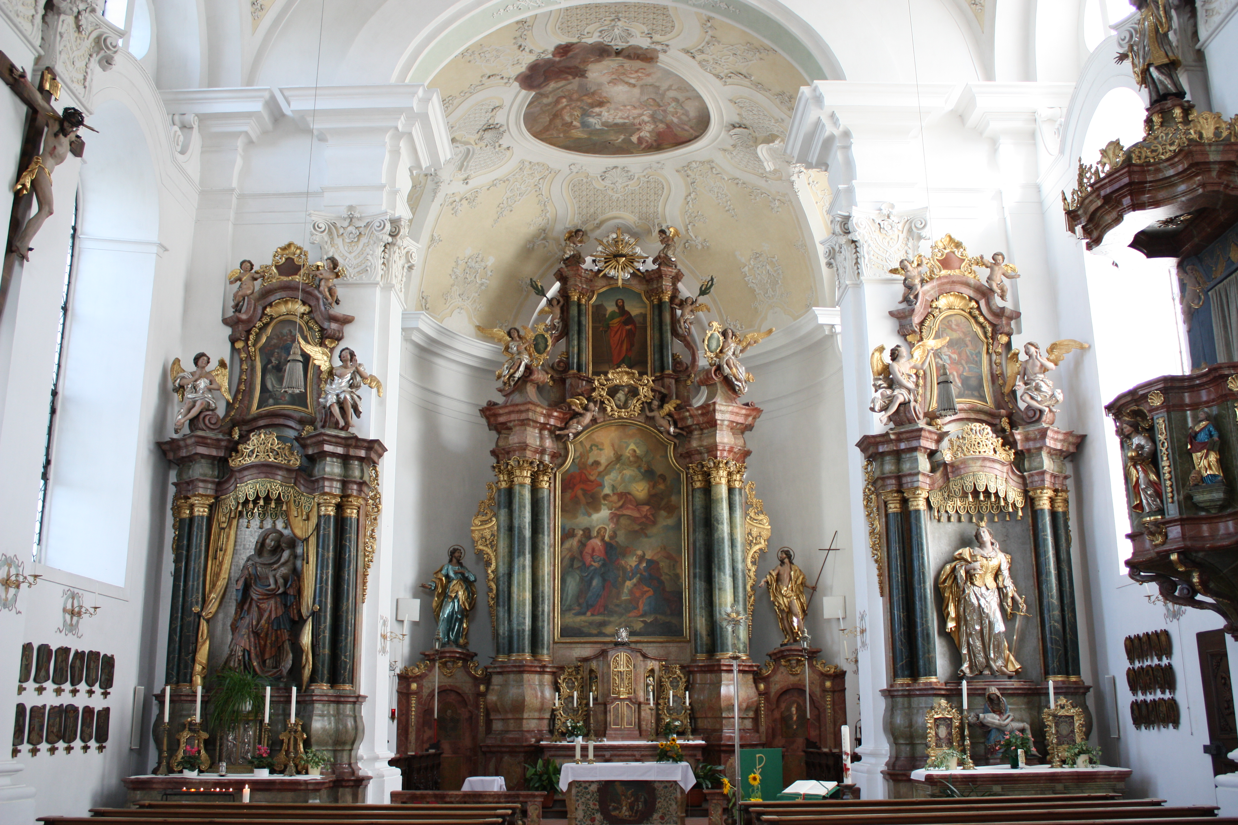 Pfarrkirche St. Peter und Paul in Buxheim (Schwaben)